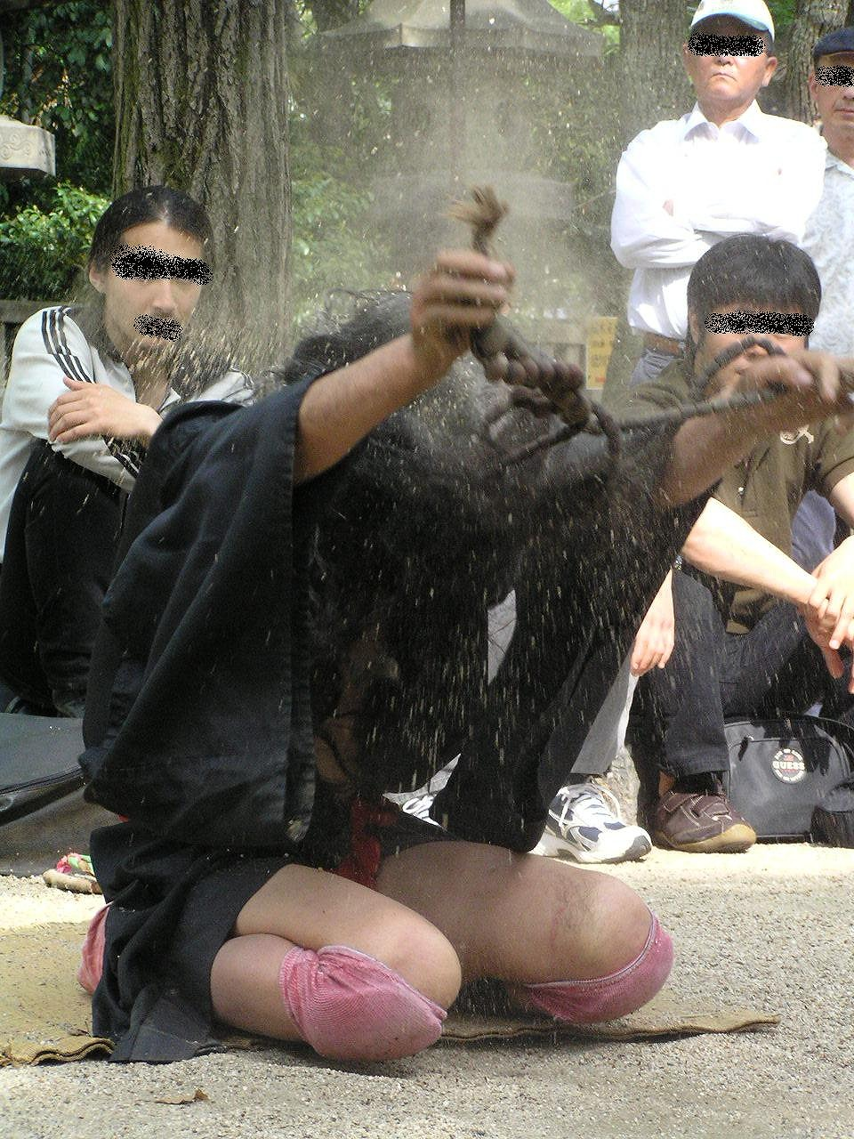 念仏じょんがら ギリヤーク尼ヶ崎 神戸公演 （湊川神社）